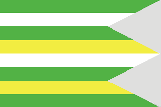 Balony község zászlaja (Szlovákia)